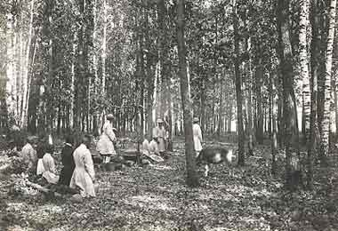 Marilaisia harjoittamassa perinteistä uskontoaan pyhässä metsässä